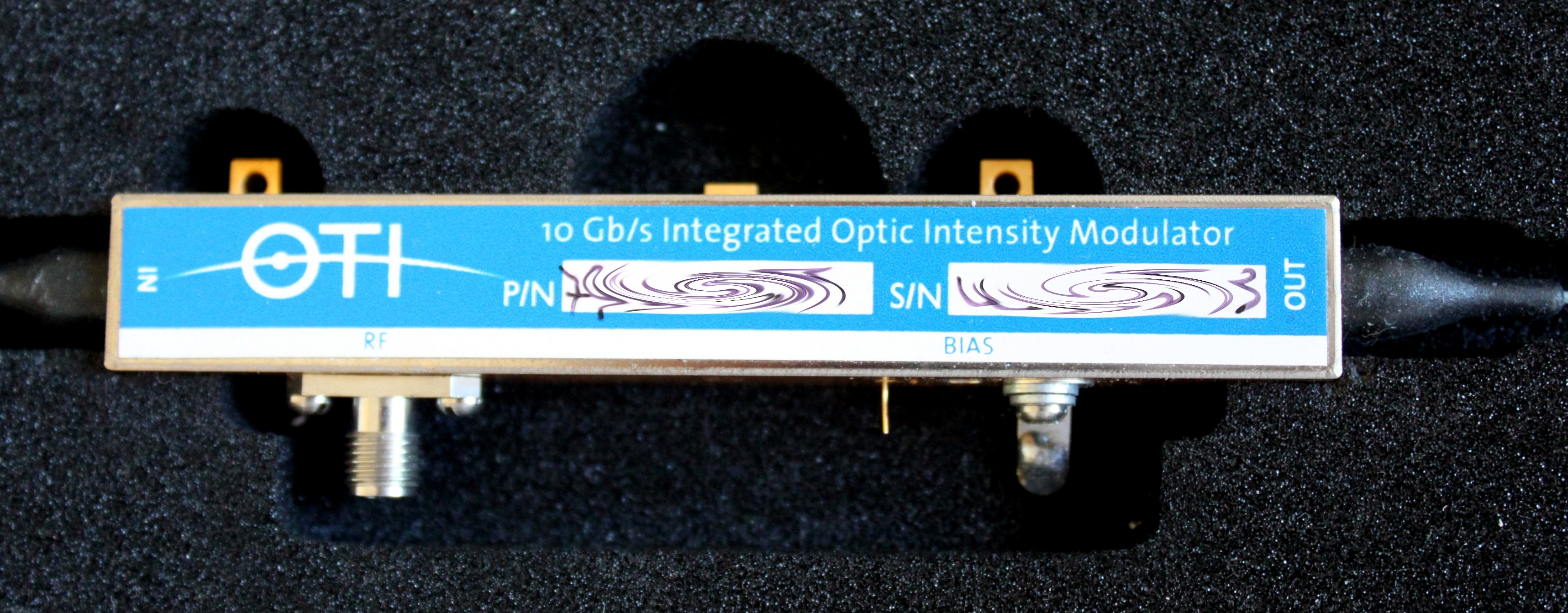 Modulateur d'intensité optique fibré. Ancien équipement utilisé au Laboratoire de Physique de l'Université de Bourgogne (désormais Laboratoire Interdisciplinaire CARNOT de Bourgogne), équipe Solitons Lasers et Communications Optiques. Le dispositif est désormais utilisé dans le cadre des travaux pratiques du département de Physique de l'UFR Sciences et Techniques.